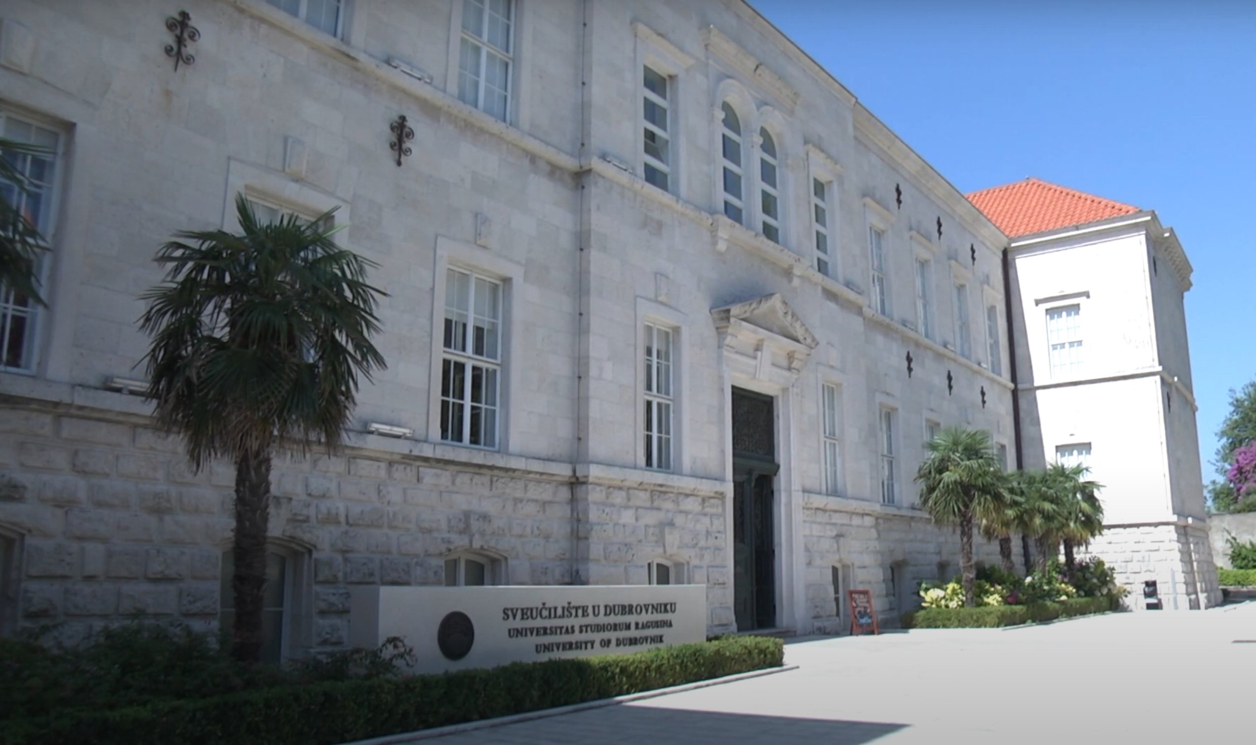 ドゥブロヴニク大学正門